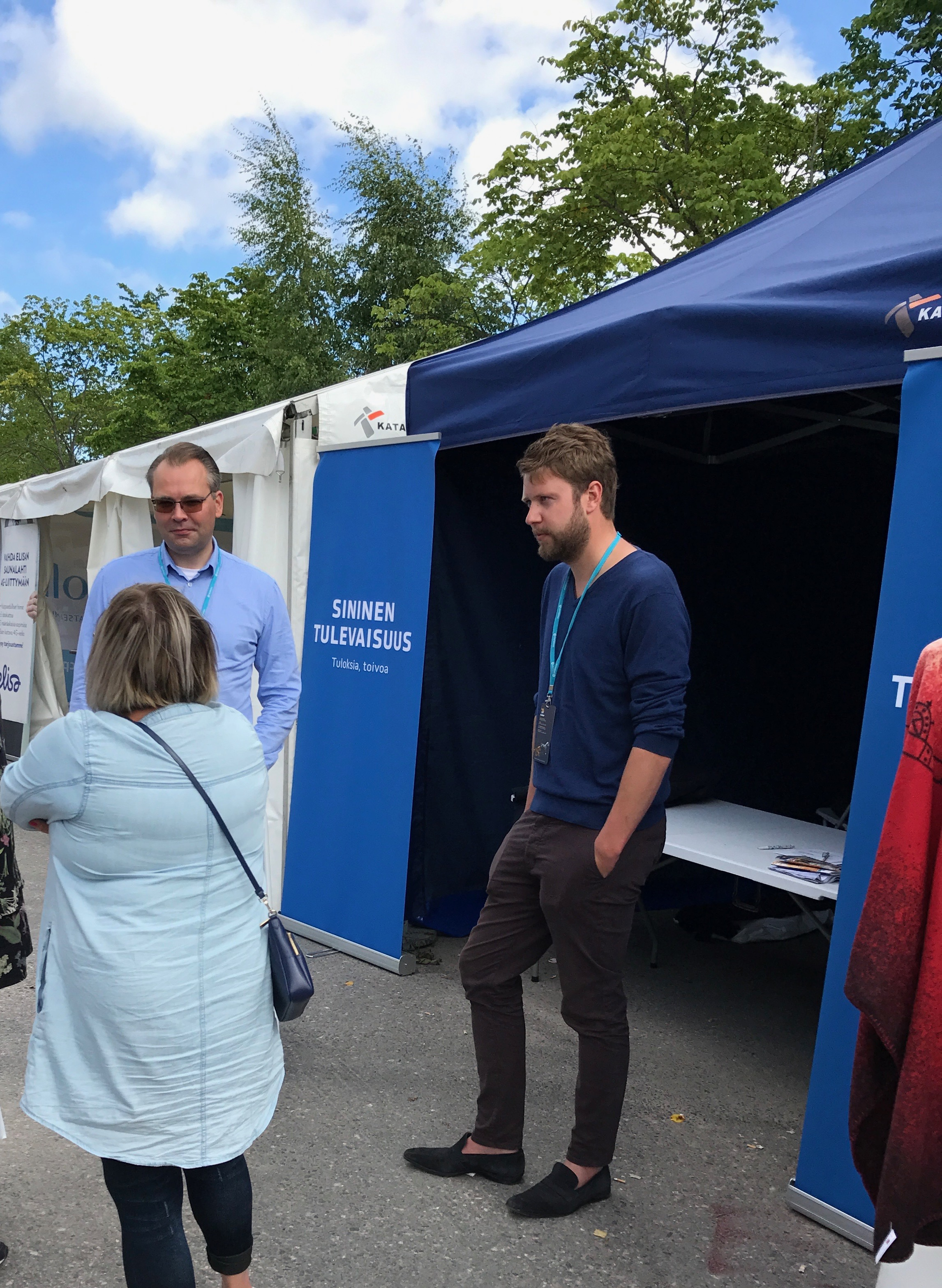 Sininen tulevaisuus -yhdistyksen teltta Vermossa.